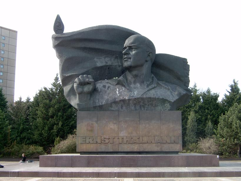 Denkmal für Ernst Thälmann von Lew Jefimowitsch Kerbel im Berliner Ernst-Thälmann-Park, Bronze auf ukrainischem Marmor, 1981/86